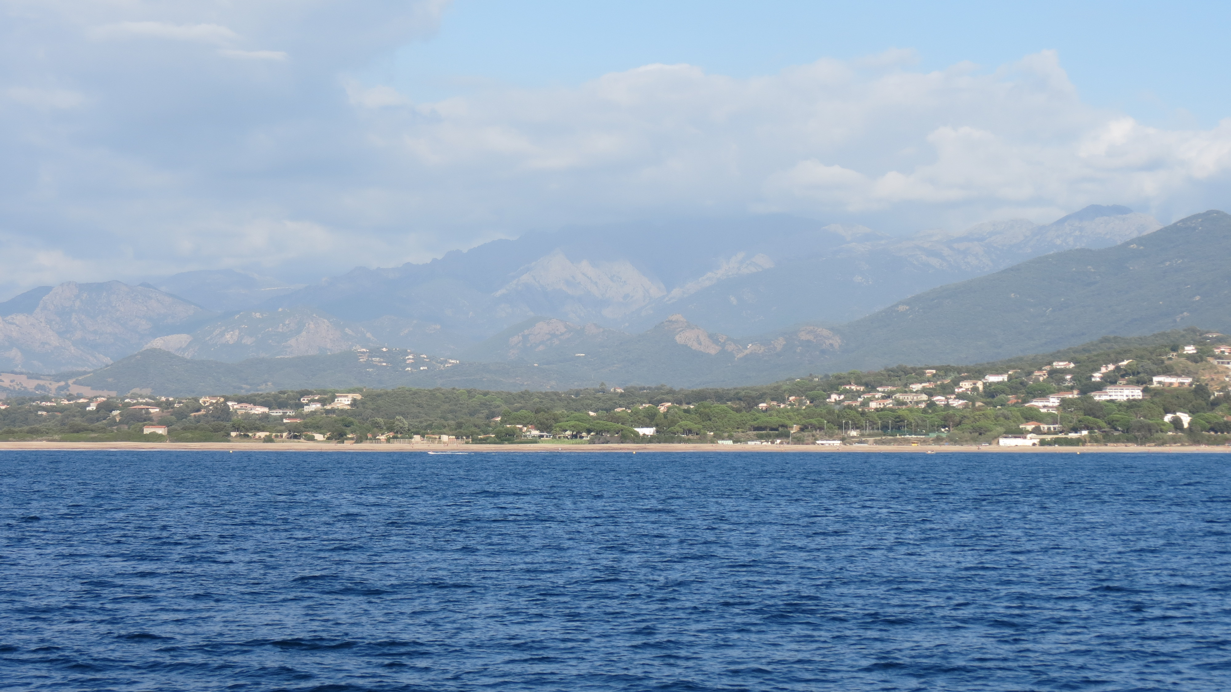 Station balnéaire de Porticcio, vue de la mer